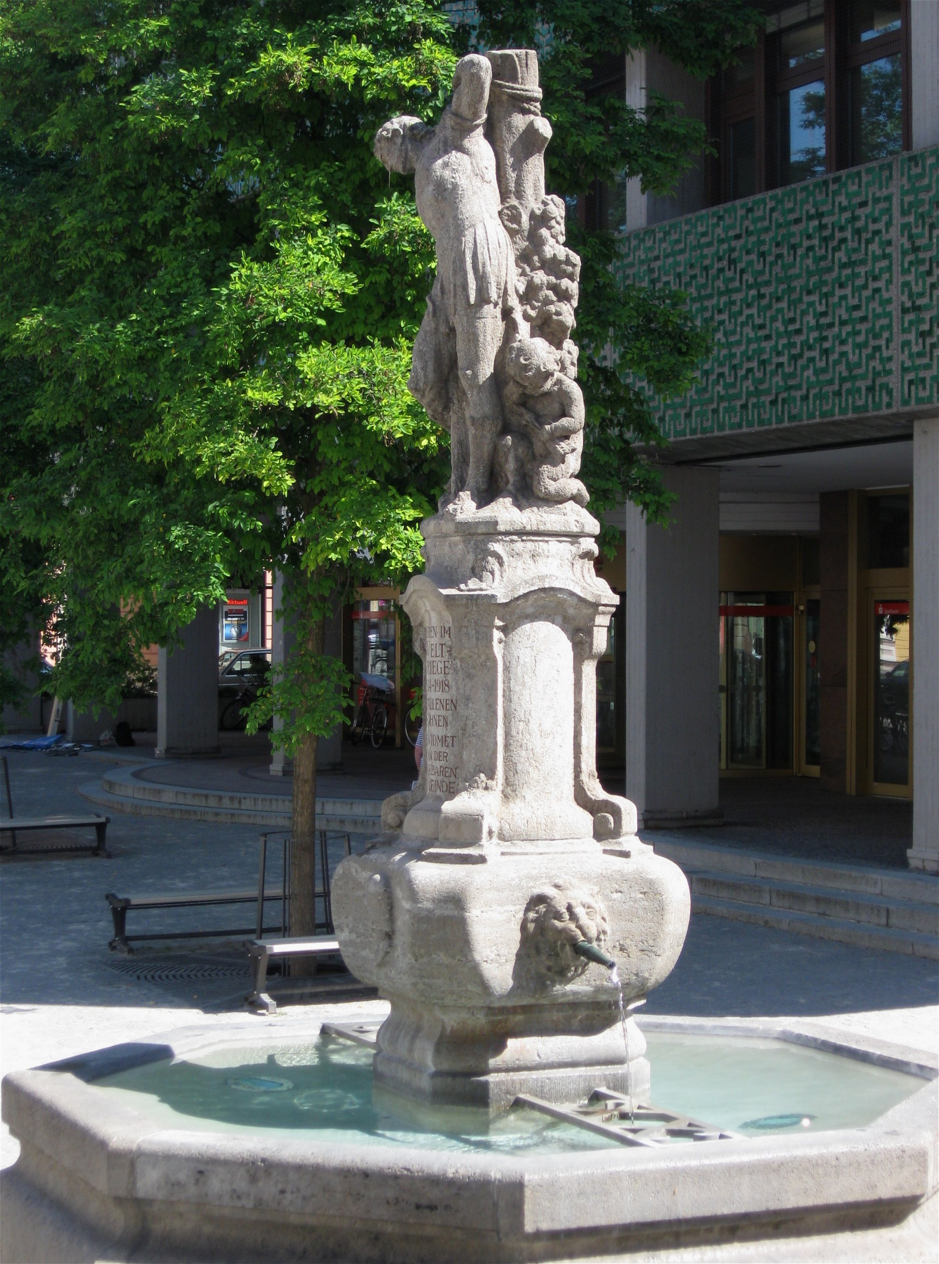 Hauptstraße. Brunnen, errichtet als Kriegerdenkmal, oktogonales Becken, Brunnenpfeiler mit Figur des Hl. Sebastian und Putten, neubarock, von Franz Hoser, um 1923 erbaut.